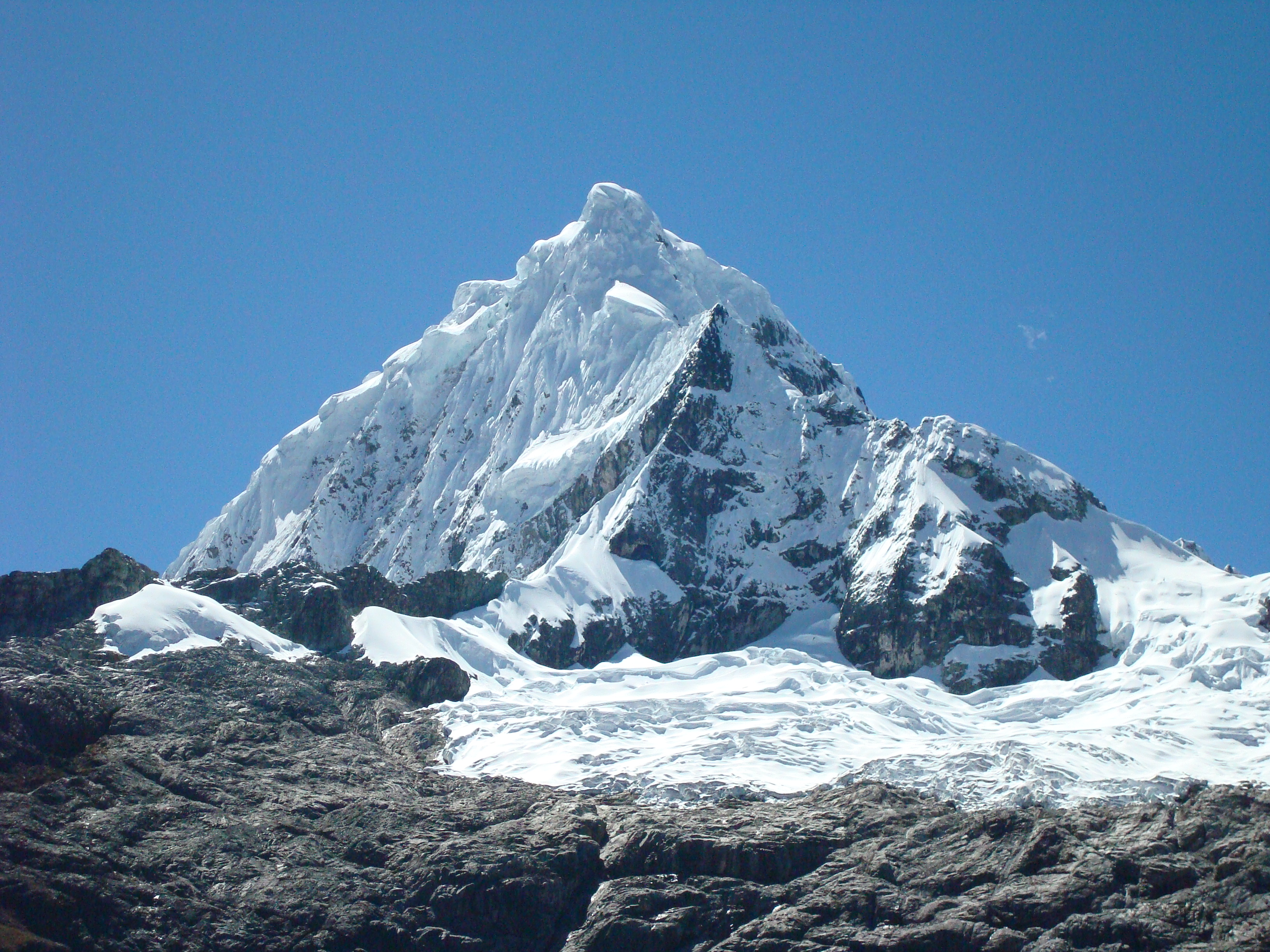 Nevado Huaguruncho